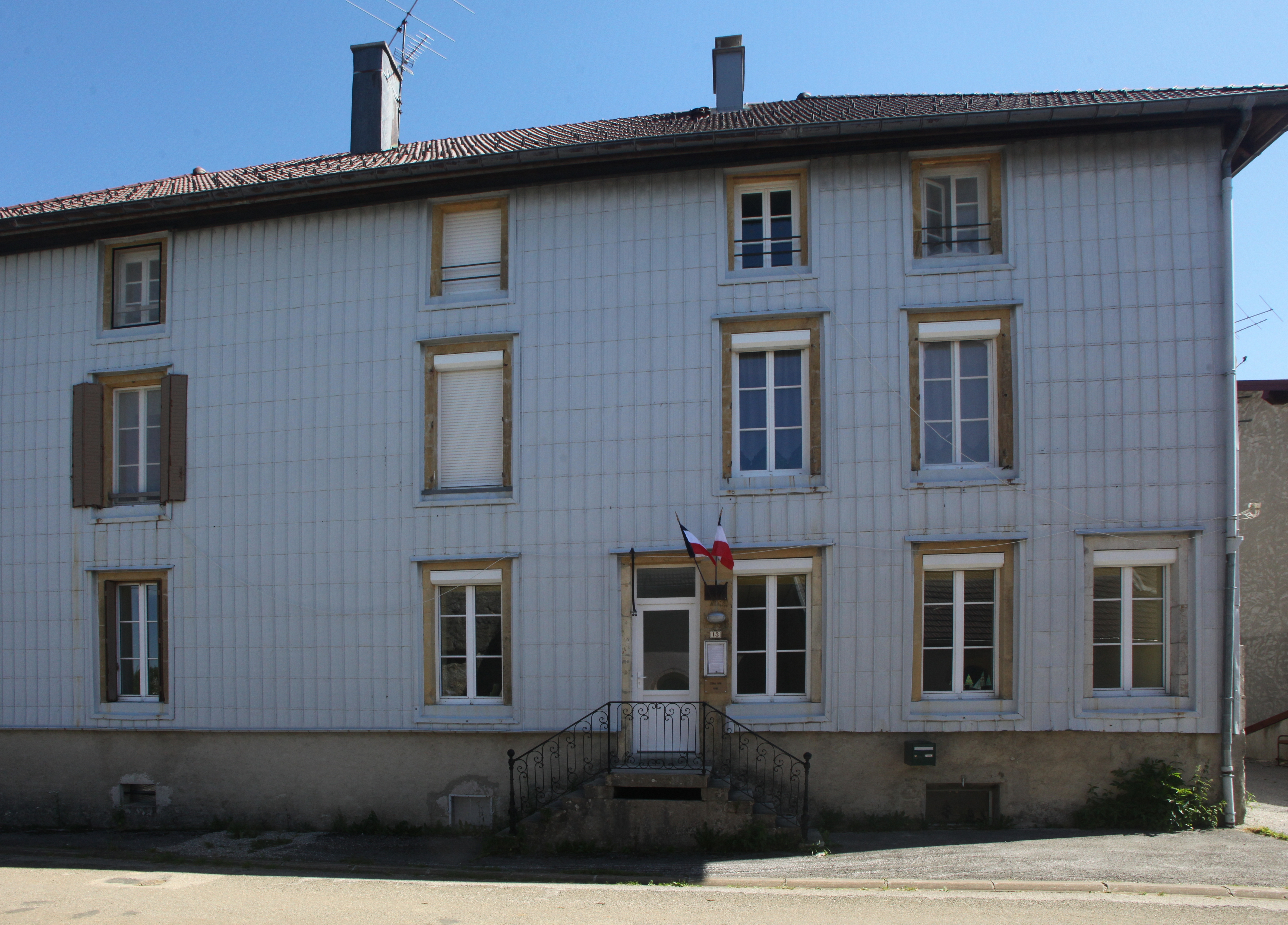 Mairie d'Esserval-Tartre (Jura).